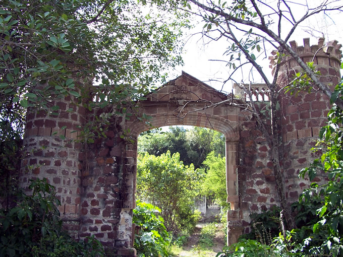 Ruinas de cantera tipo medieval, del molino de arroz la Guadalupe que existío en Parácuaro, Michoacán.